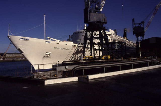 Cammell Laird, Hebburn